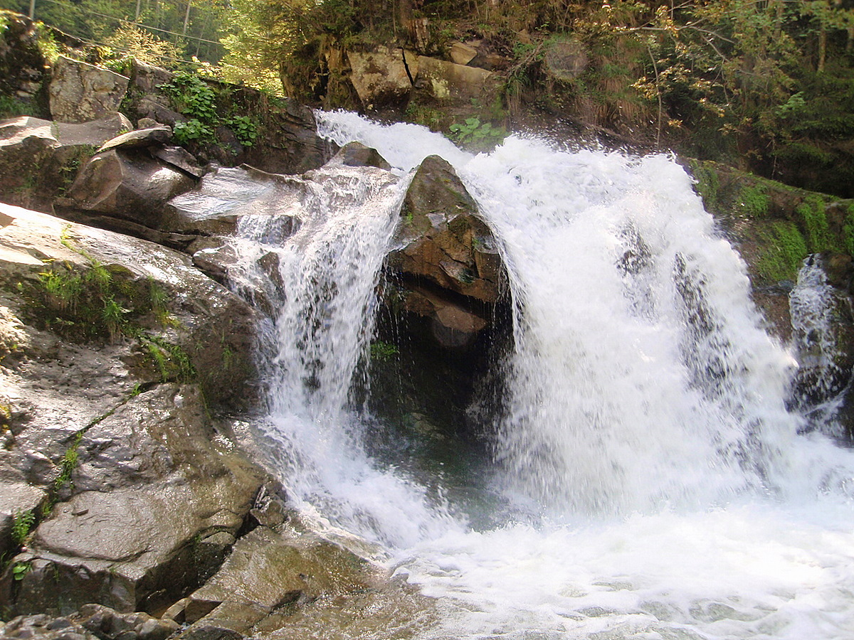 Каменецкий водопад. Сколевский район. Львовская область